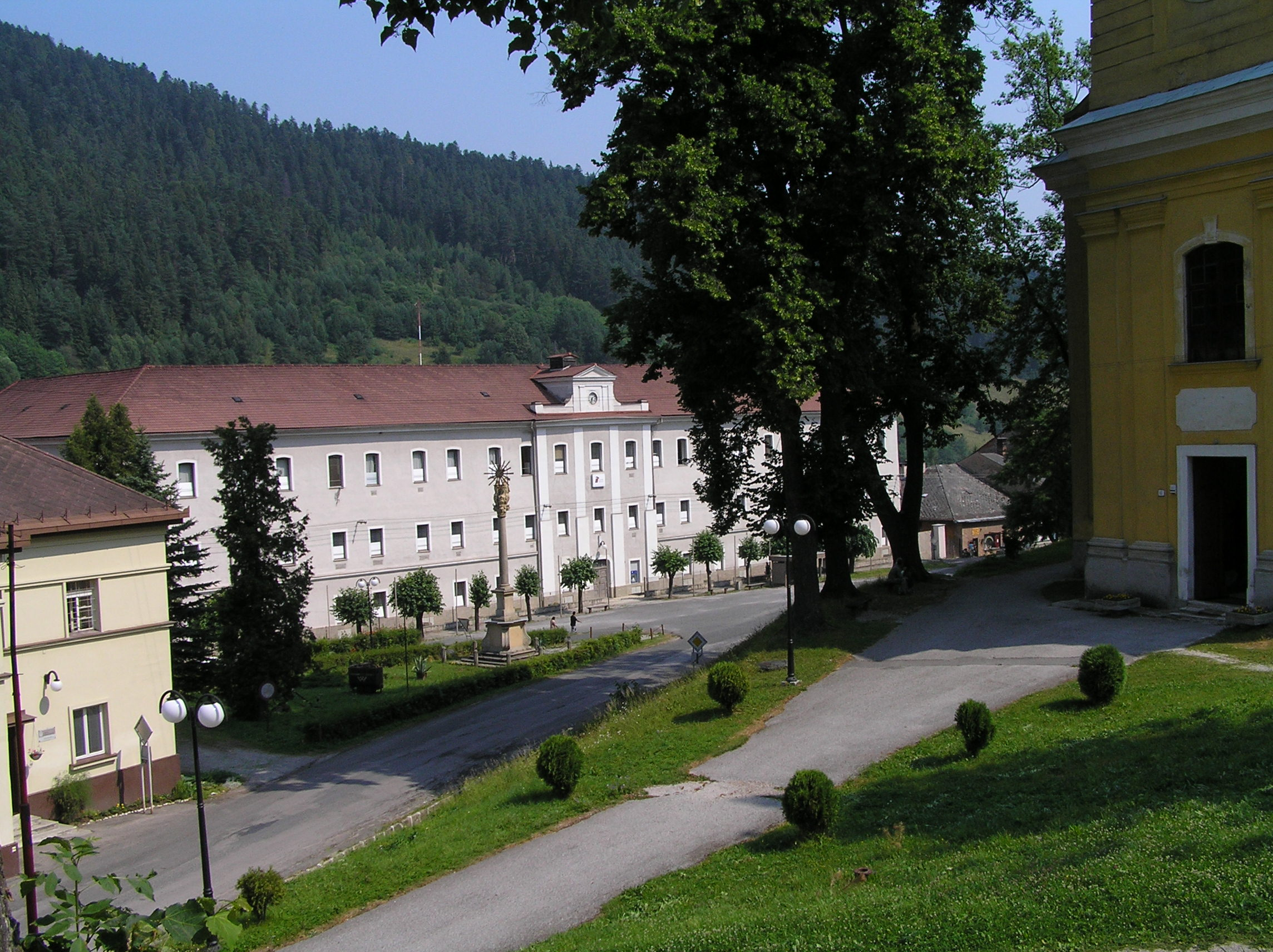 tabaková továreň Smolník